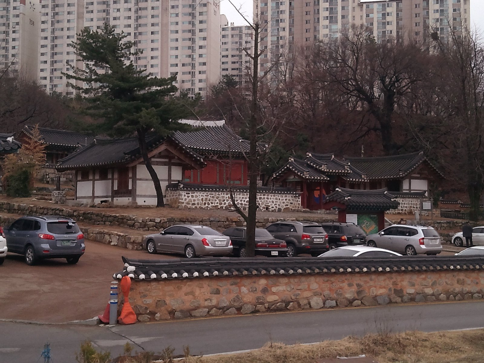 심곡서원